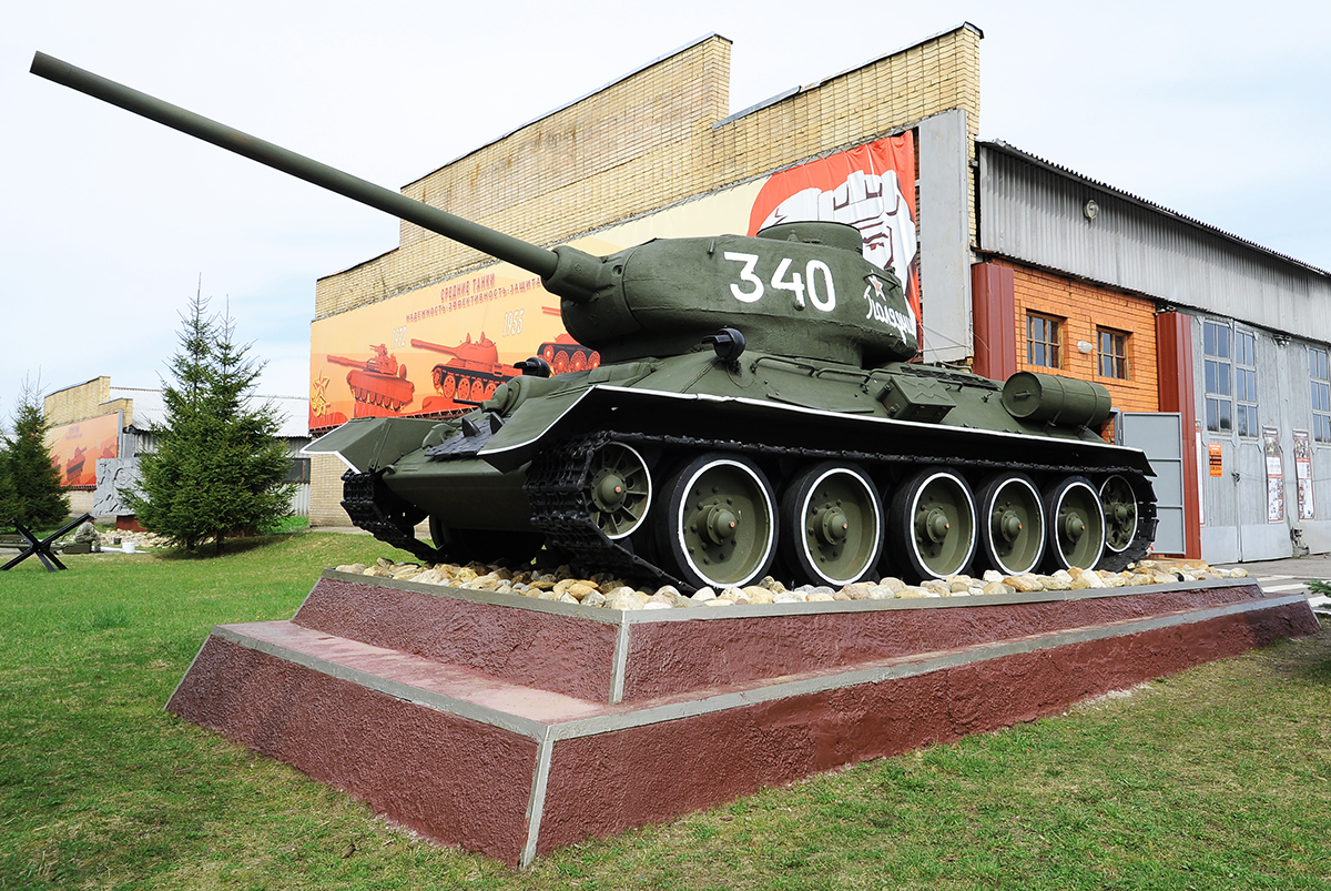 Tank T-34-85